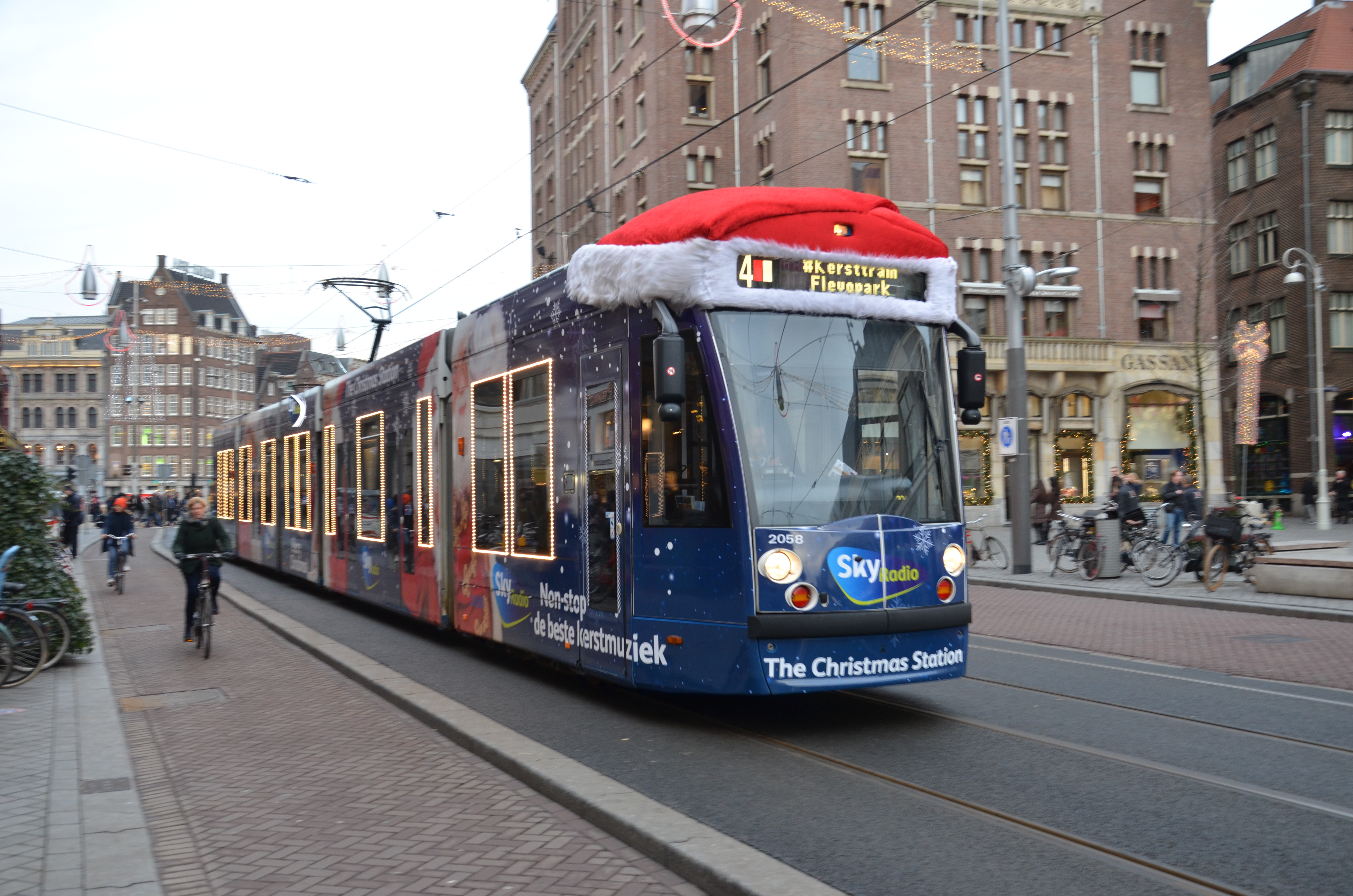 Een kersttram van Skyradio op het Rokin in Amsterdam.